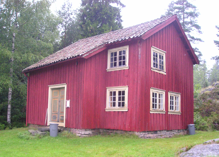 Drangedal bygdetun: Våningshuset fra heigården Myra er en av de mange bygningene som er flyttet til bygdetunet.